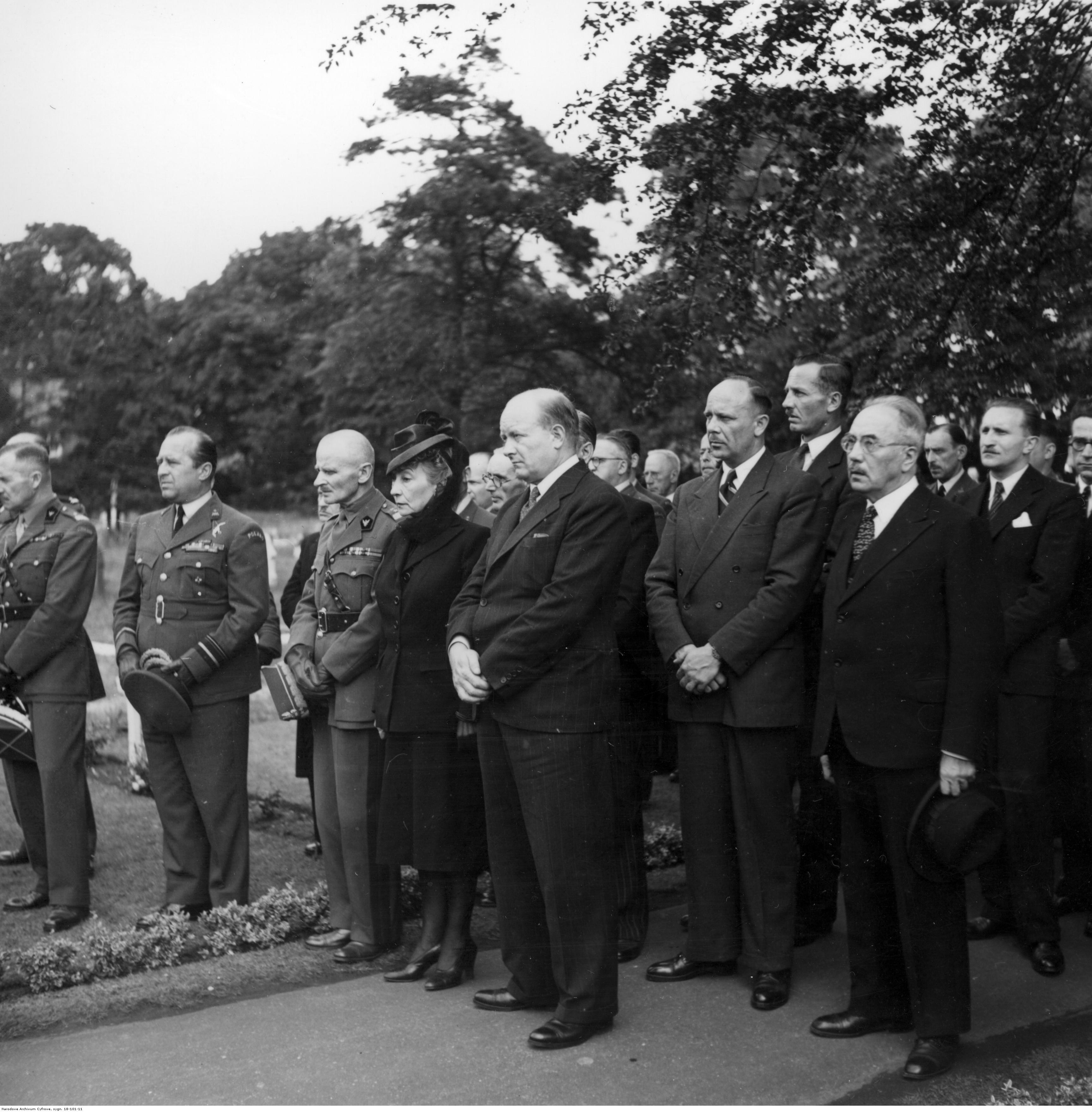 Pierwsza rocznica śmierci gen. Władysława Sikorskiego - złożenie wieńców na grobie. Uczestnicy uroczystości przed grobem gen. Władysława Sikorskiego. W pierwszym szeregu od lewej: gen. Stefan Dembiński, gen. Mateusz Iżycki, gen. Marian Kukiel, Helena Sikorska, premier Stanisław Mikołajczyk, minister Stanisław Kot. Między premierem a ministerem Kotem minister Władysław Banaczyk. Archiwum Fotograficzne Czesława Datki. Sygnatura: 18-101-11